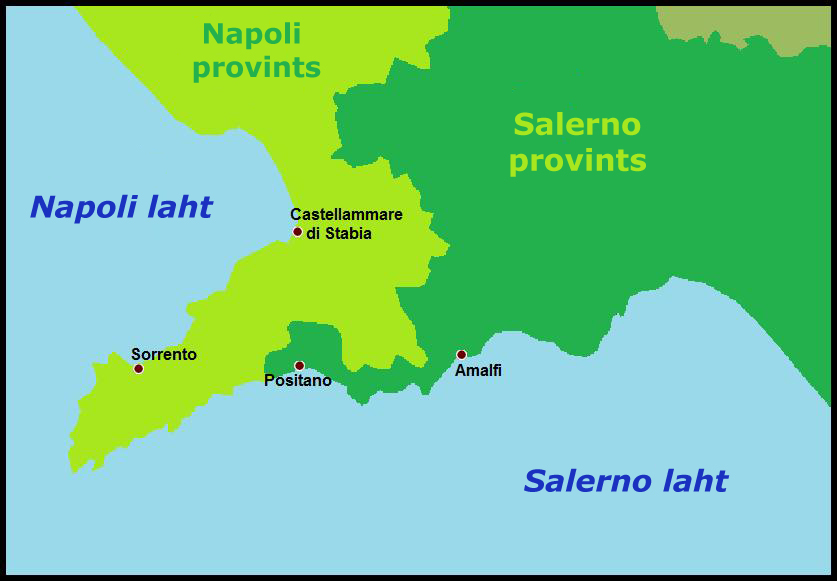 Sorrento poolsaar